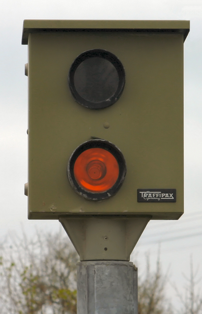 Starenkasten / Geschwindigkeitsüberwachungsanlage